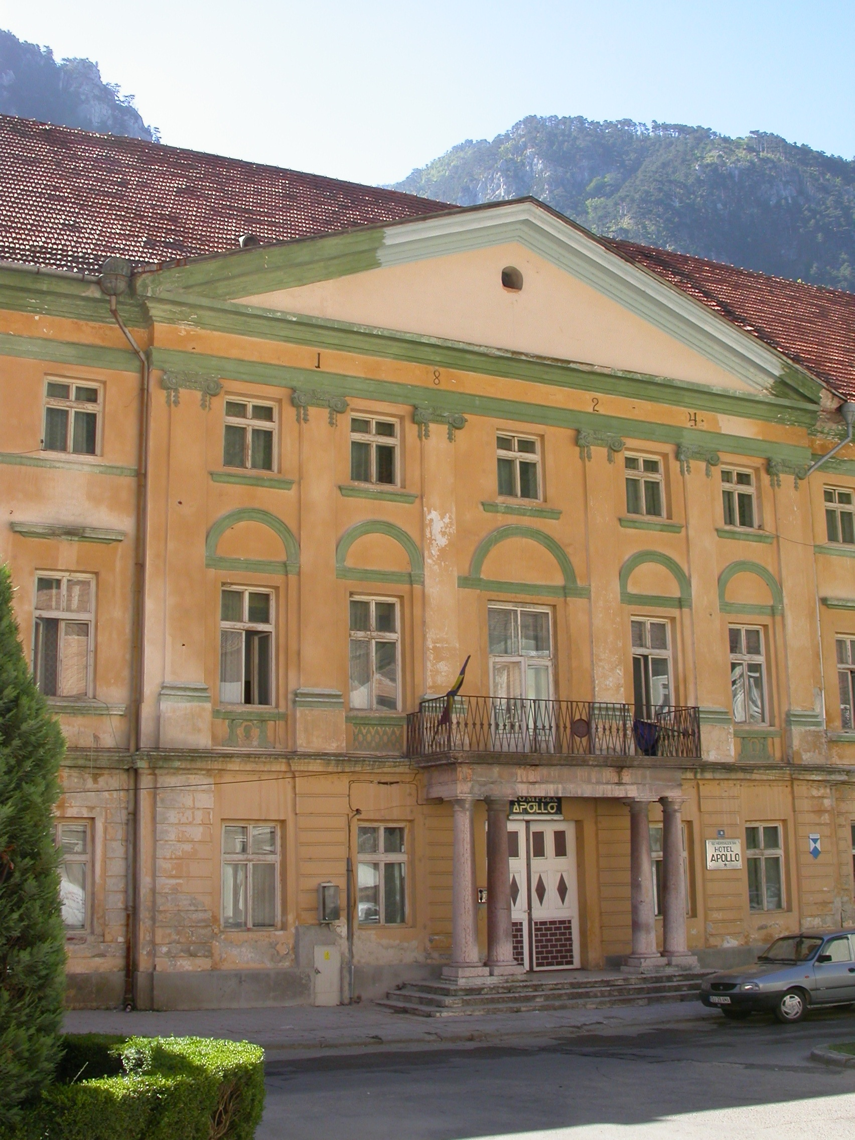 Ansamblul balnear Apollo II